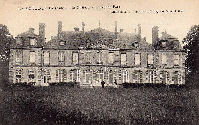 Château de La Motte-Tilly (c. 1900). Aube, Champagne-Ardenne.